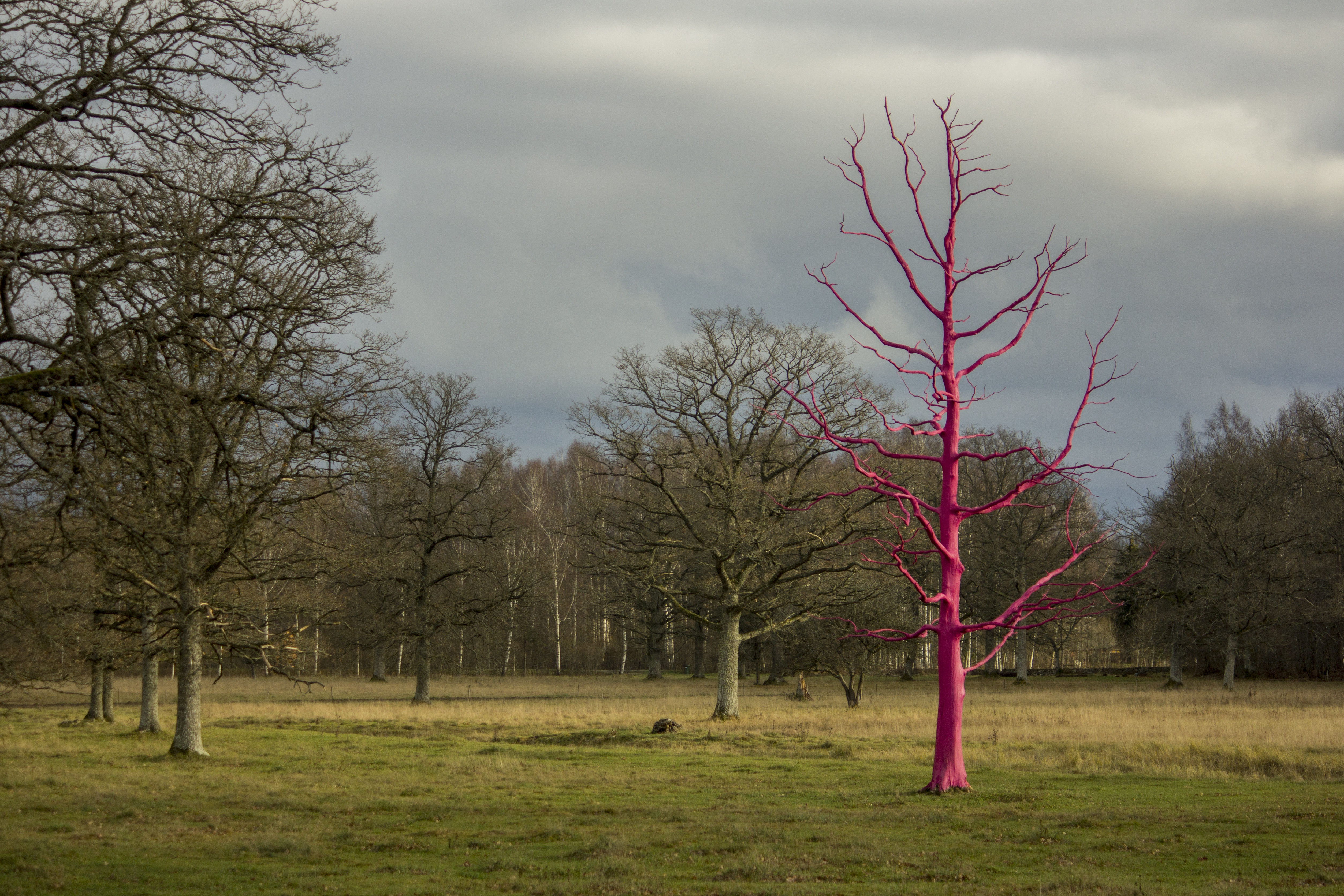 Saaremaal värviti Arboristide Koda MTÜ eestvedamisel kuivanud tamm fuksiaroosaks, et kinnistada inimese alateadvusesse terve puu rikkumata võragraafika.